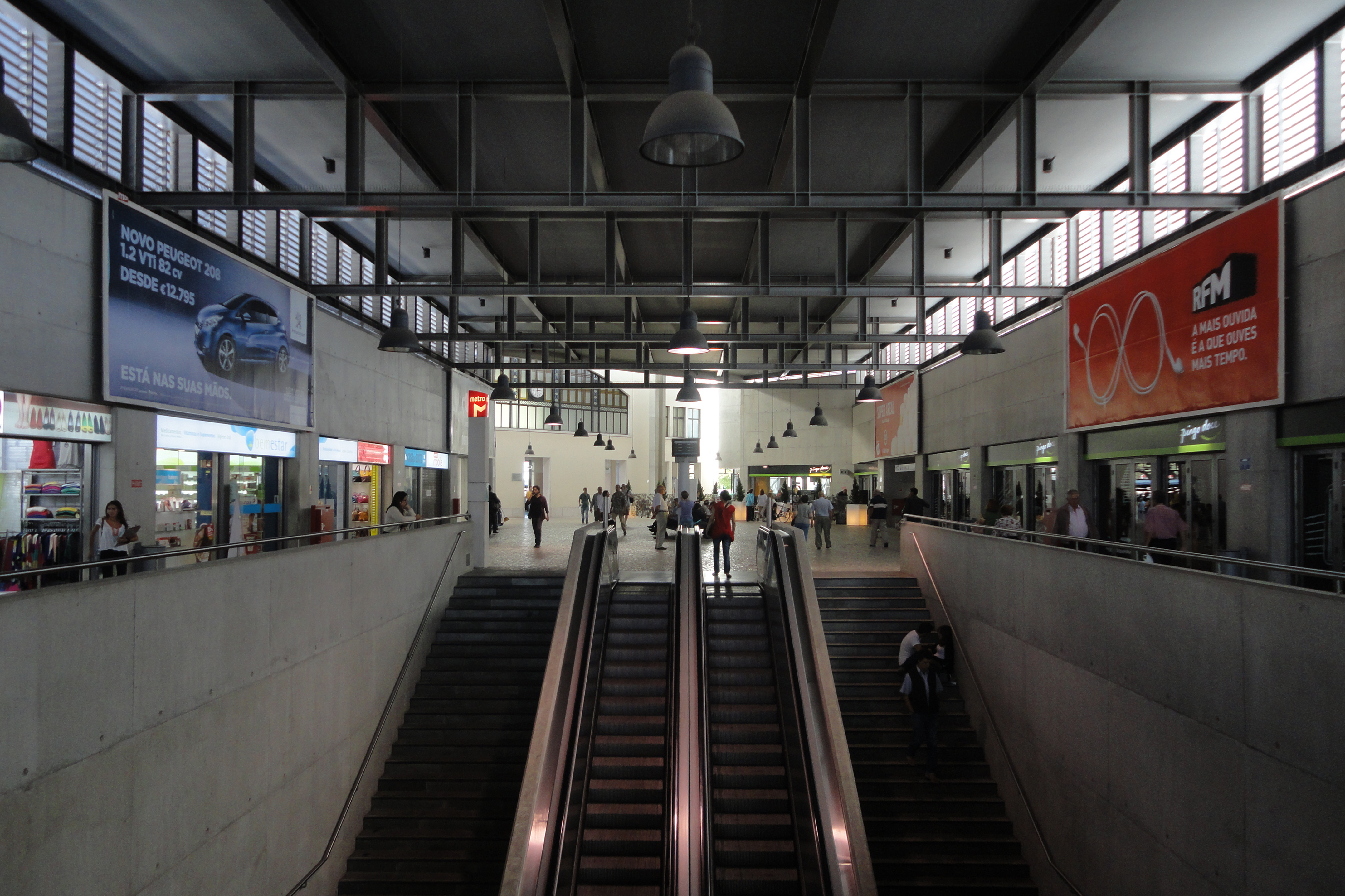 Terminal ferroviario, Cais do Sodre, Arq. Pedro Botelho - Prémio Valmor e Municipal de Arquitetura 2008